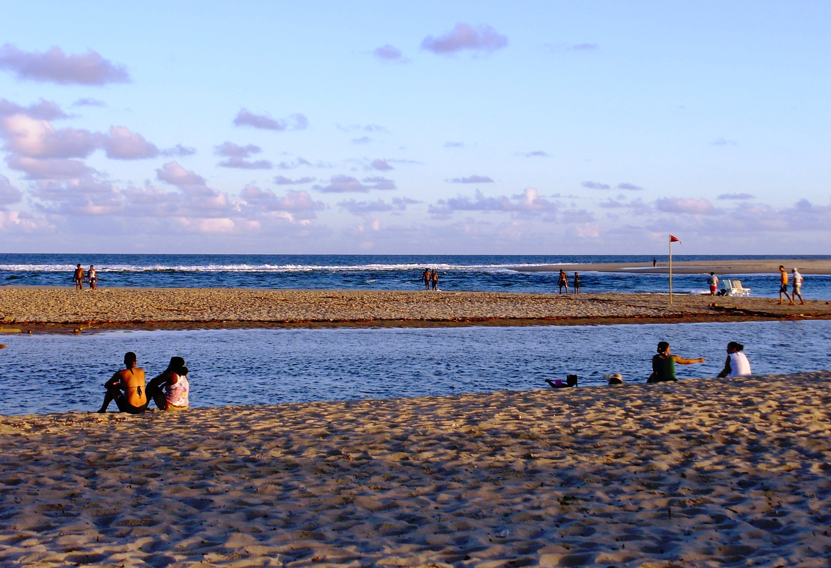 Encontro do rio com o mar - Barra de Jacuípe - Camaçari. Foto: Tainara Figueiredo/Setur